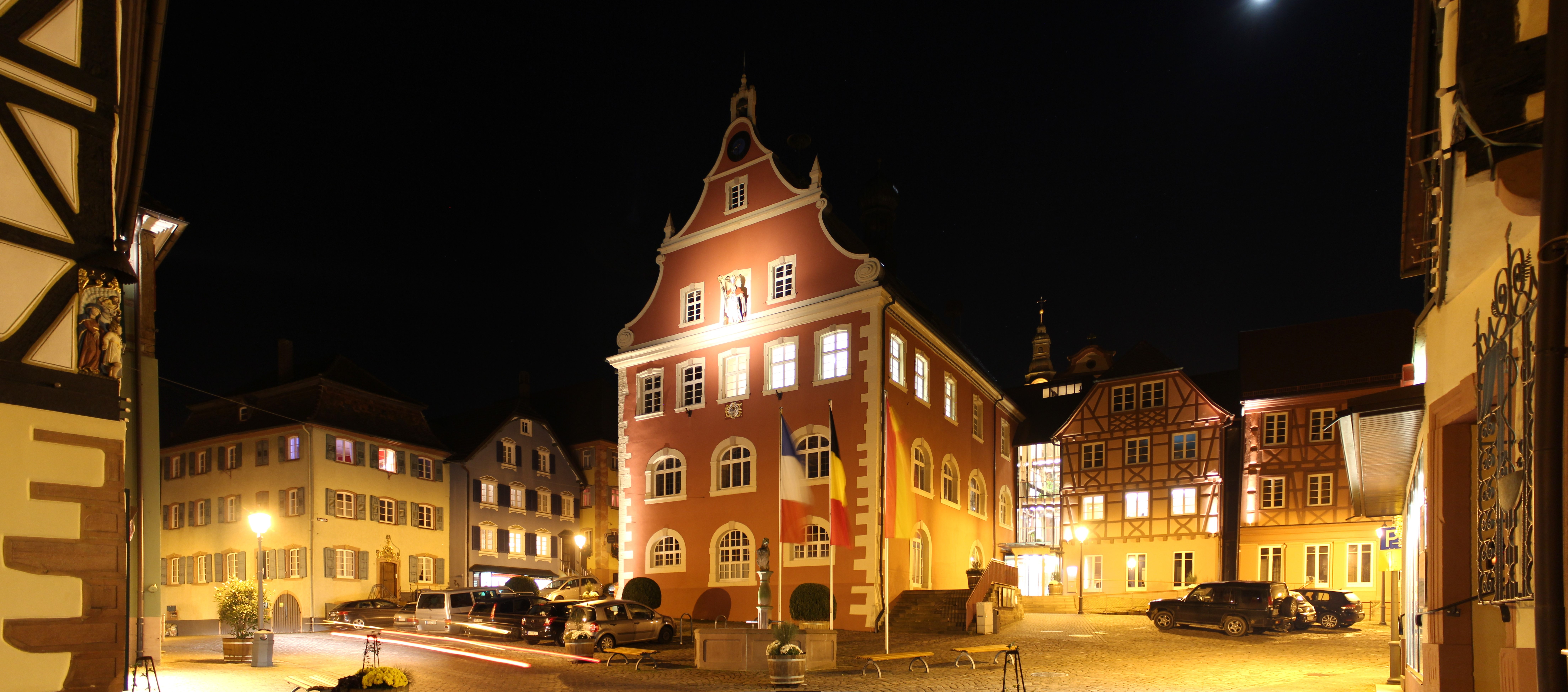 Rathaus Ettenheim